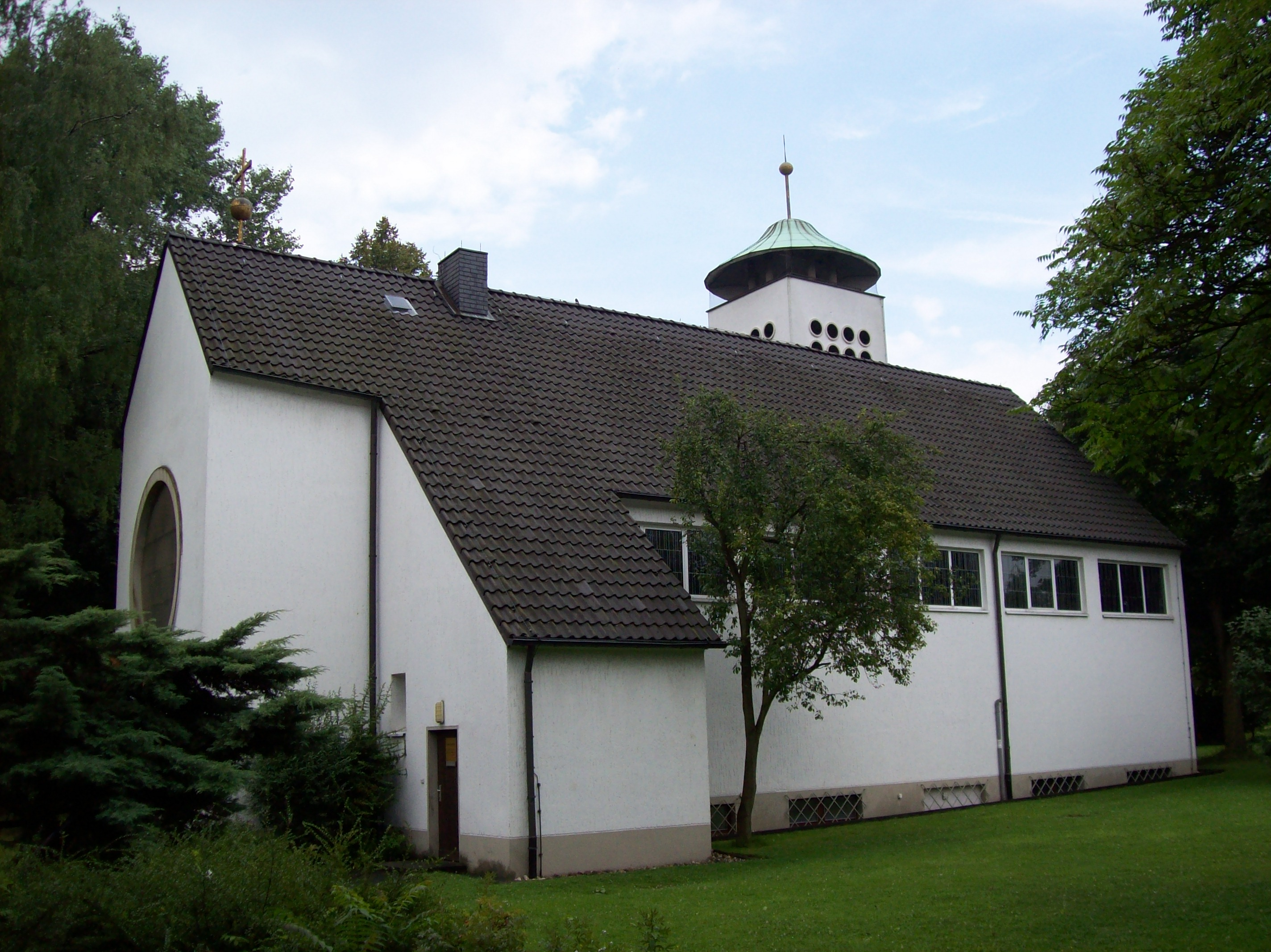 Evangelische Kirche in Köln-Ostheim Architekt: Gerhard Langmaack